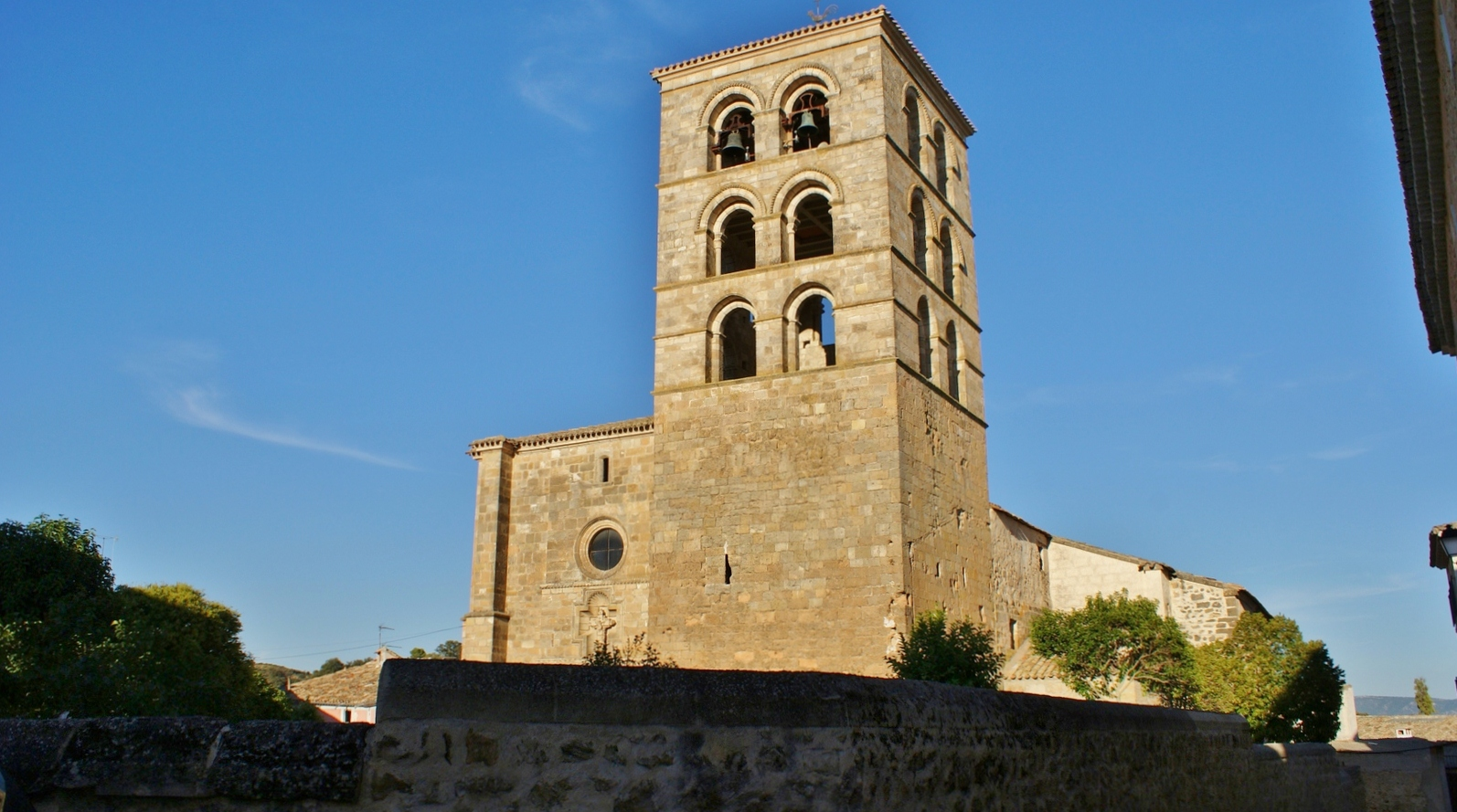 Iglesia de Nuestra Señora de la Asunción, Estilo románico en su gran mayoría. Se cree que fue creada por monjes cistercienses llegados a Cócoles, población cercana de la provincia de Guadalajara, en el siglo XII. Iglesia de Nuestra Señora de la Asunción de Valdeolivas. Cuenca, Castilla-La Mancha